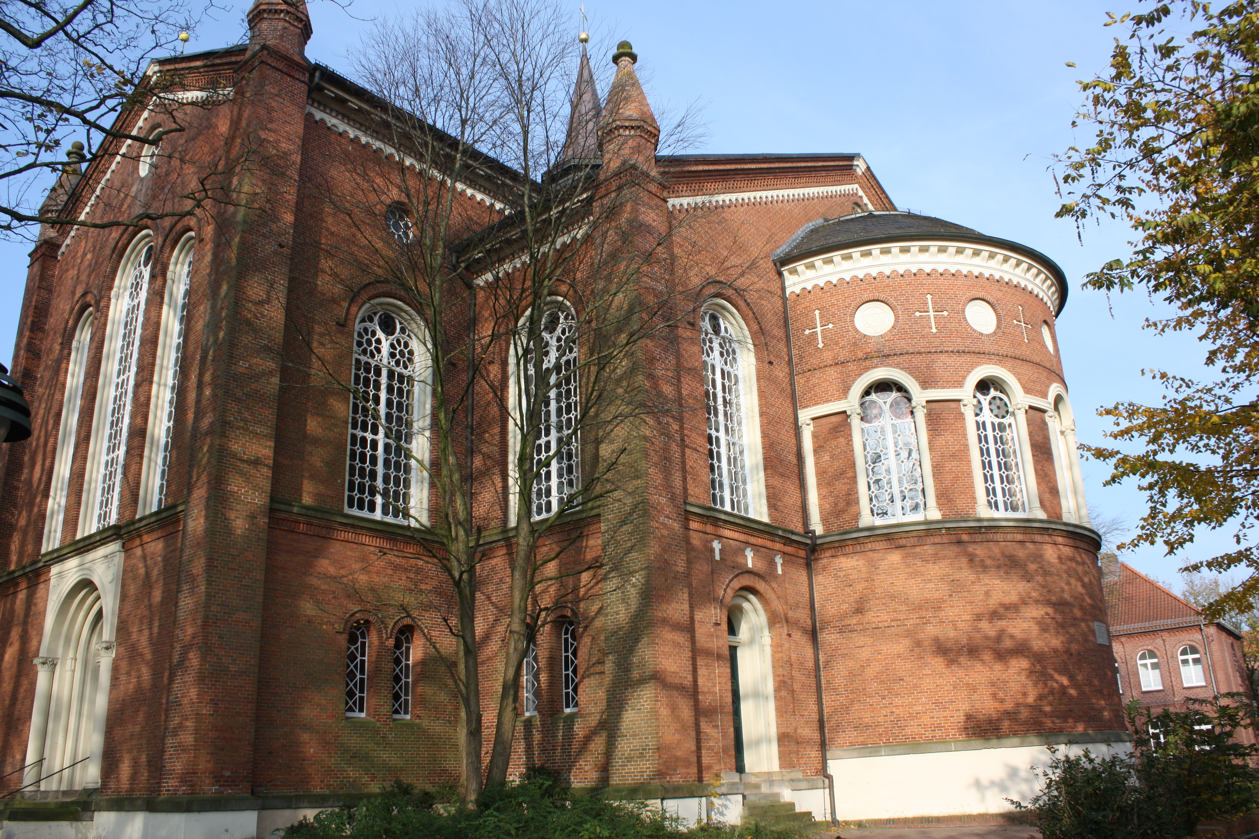 Süd-Ost-Ansicht von St. Magnus in Esens